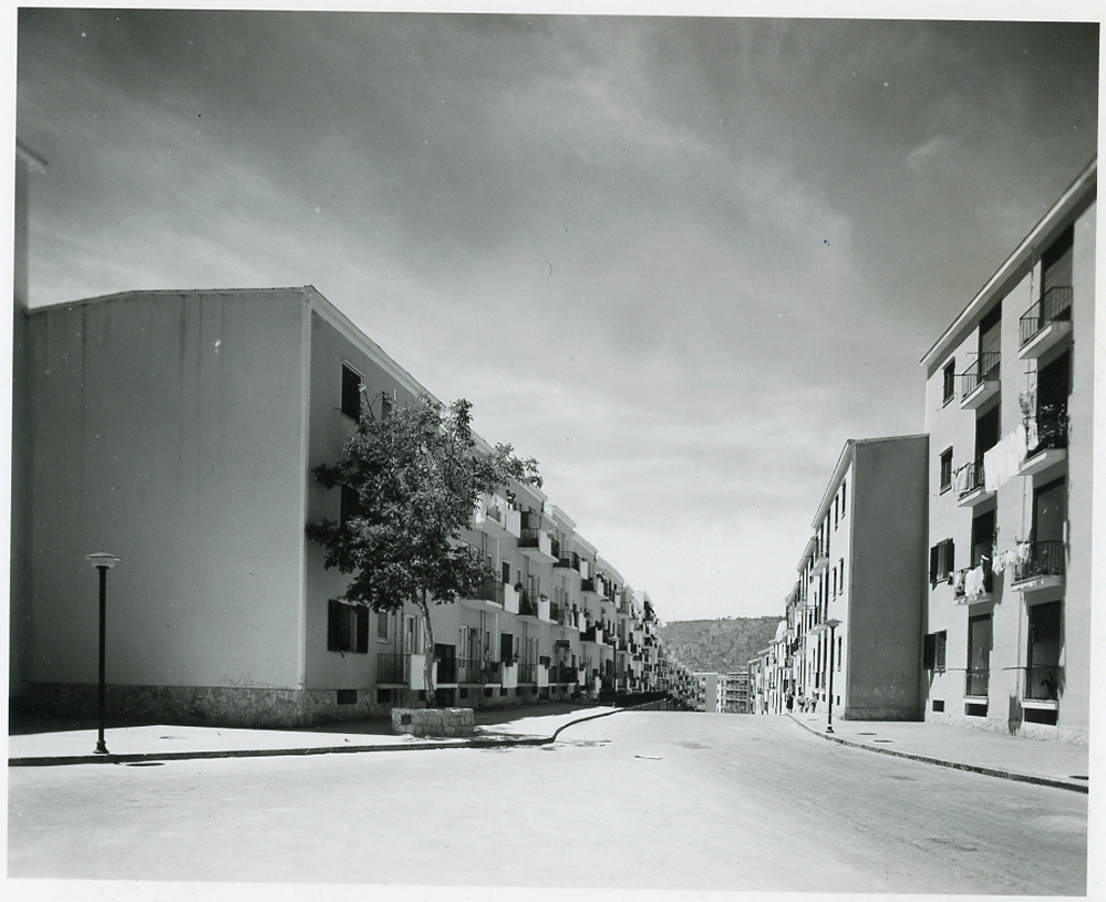 Servizio fotografico : Napoli, 1956 / Paolo Monti. - Fototipi: 2 : Positivo b/n, gelatina bromuro d'argento/ carta, provino a contatto da pellicola 10x12. - ((Serie costituita da 2 provini a contatto dei negativi identificati con i nn.: 107, 197 (secondo altra numerazione manoscritta al verso dei provini). - La suddetta serie è contenuta nella scatola dei contatti identificata con il n.144; sul coperchio iscrizione didascalica manoscritta a pennarello nero: "Contatti 7c". - Occasione: Documentazione del riordino e sistemazione dei Musei del Castello e per la pubblicazione: Belgiojso L., Peressutti E., Rogers E.N., "Il riordino dei Musei del Castello Sforzesco di Milano", in "Casabella", n. 211, 1956. - Fonte: Rubrica di Paolo Monti: Archivio 10x12 (ultimi numerati) - dal G1 al (s.d.), presso Archivio Paolo Monti. - Fonte: Monografia di Belgiojoso L. Peressutti E., Rogers E.N.: Il riordino dei Musei del Castello Sforzesco di Milano, in Casabella, n. 211 (1956)